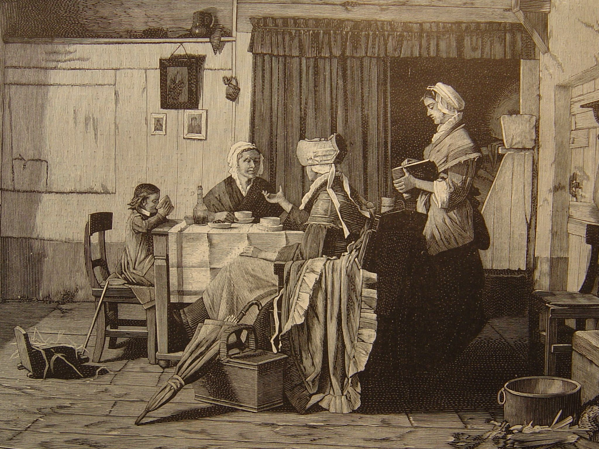 Rarement l'intérieur campagnarde n'a été rendu avec plus de vérité et de naturel. Le dimanche la maisonnette apparait avec un air de propreté. Remarquez le chapeau à grands rubans sur la tête, le panier, le parapluie. Pendant que les deux femmes jacassent la servante entasse sur une assiette des piles de tartines, la filette vide la dernière goutte de sa jatte.